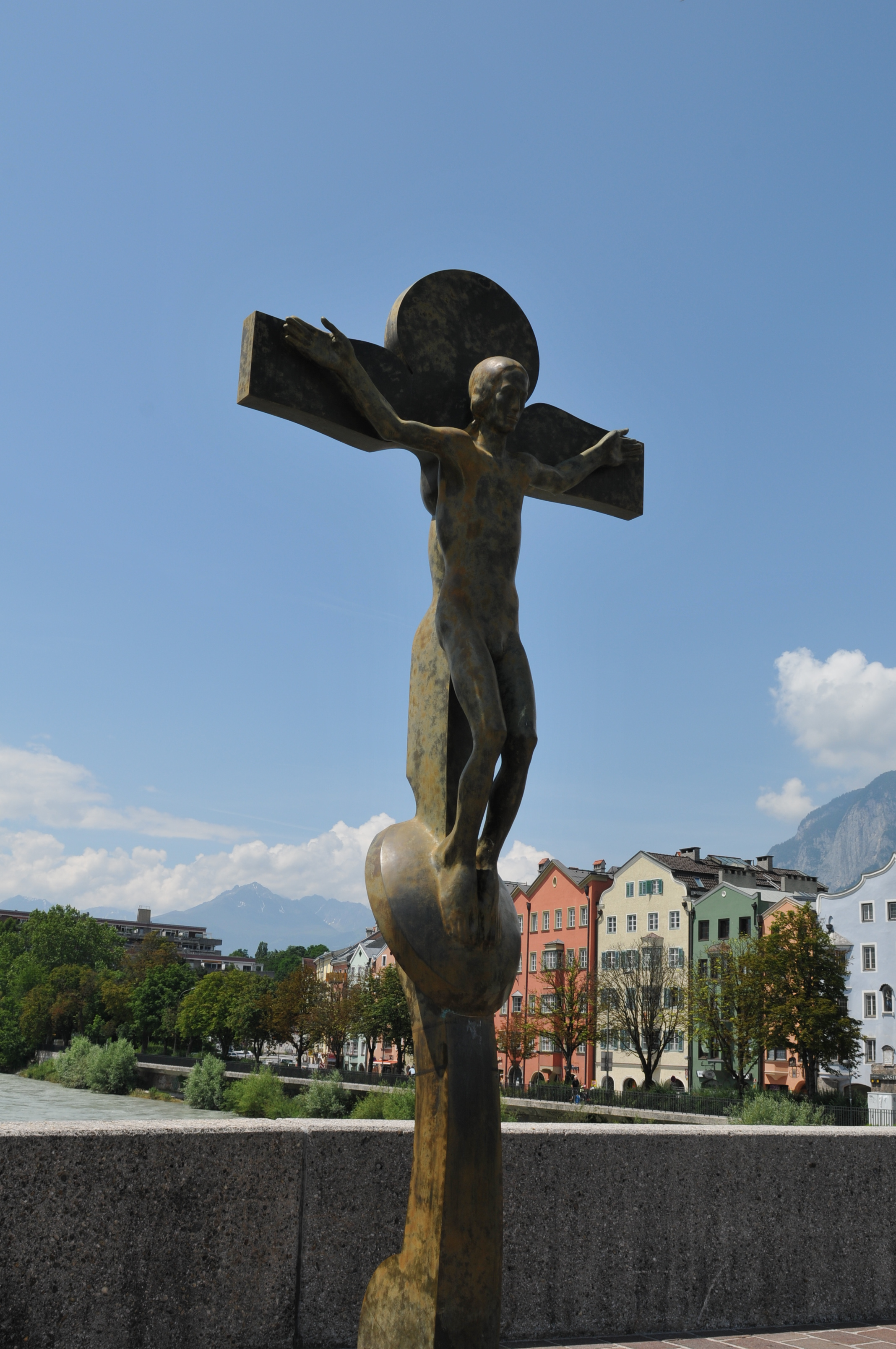 奥地利因斯布鲁克 Innsbruck, Austria